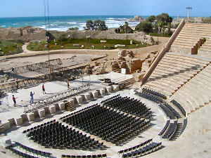 Antikes Theater in Caesarea (Keysarya), Israel. Fotografiert von Benutzer:datafox Ausdrücklich als GNU freigegeben. bei Fragen